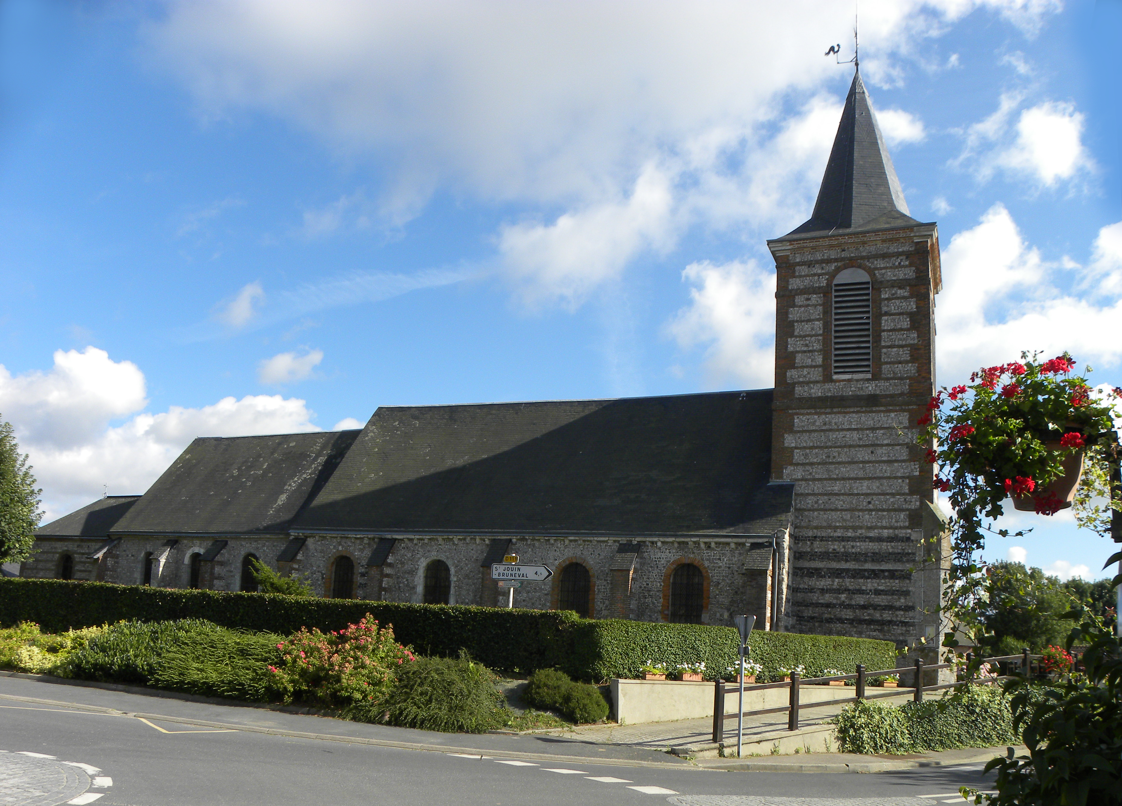 Eglise du village.